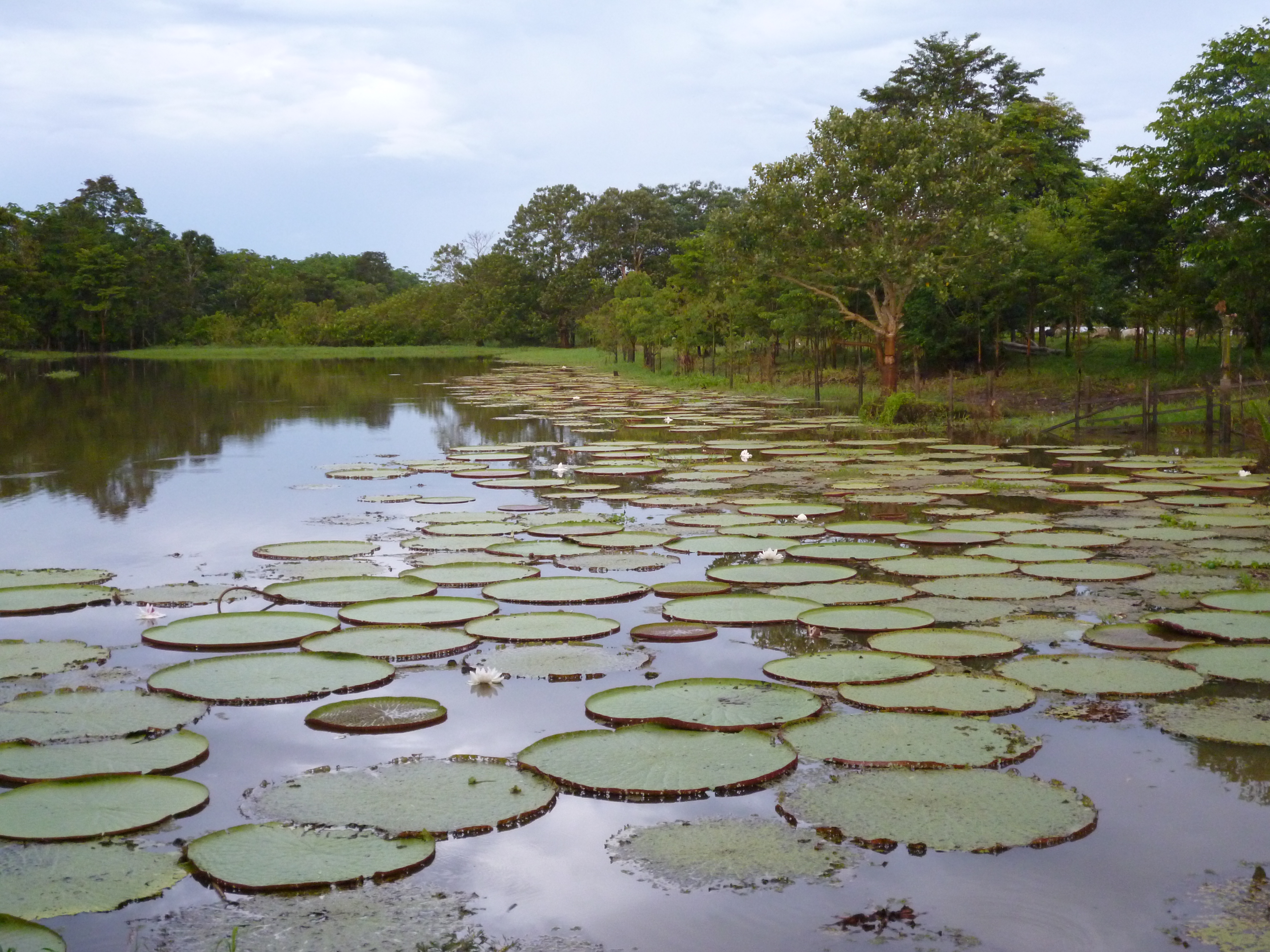 Victorias regia en Leticia